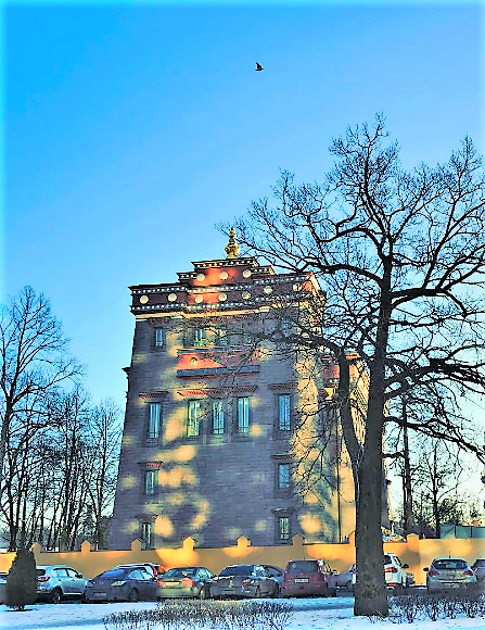 St. Petersburg datsan 2017